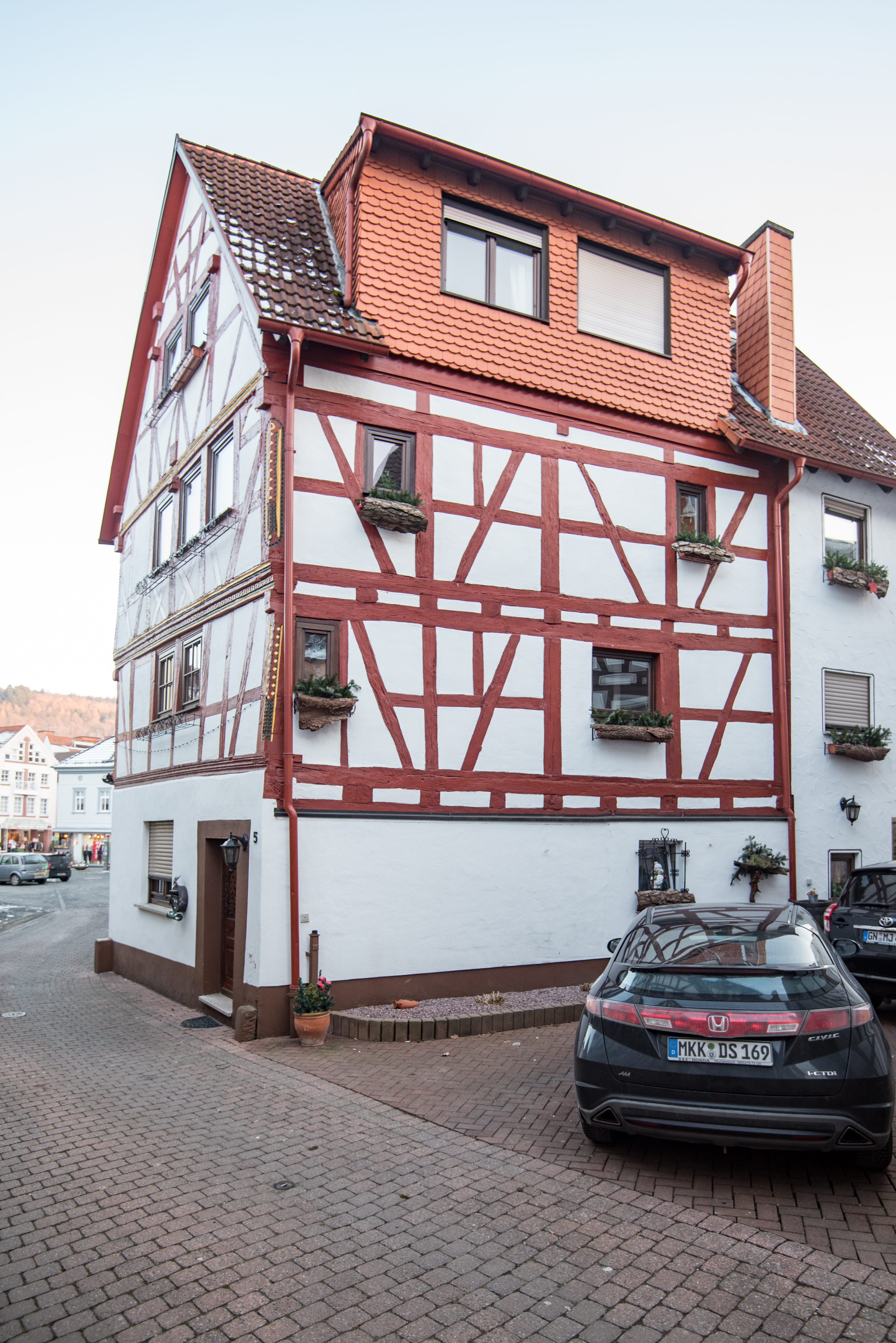 Bad Orb, Kirchgasse 5